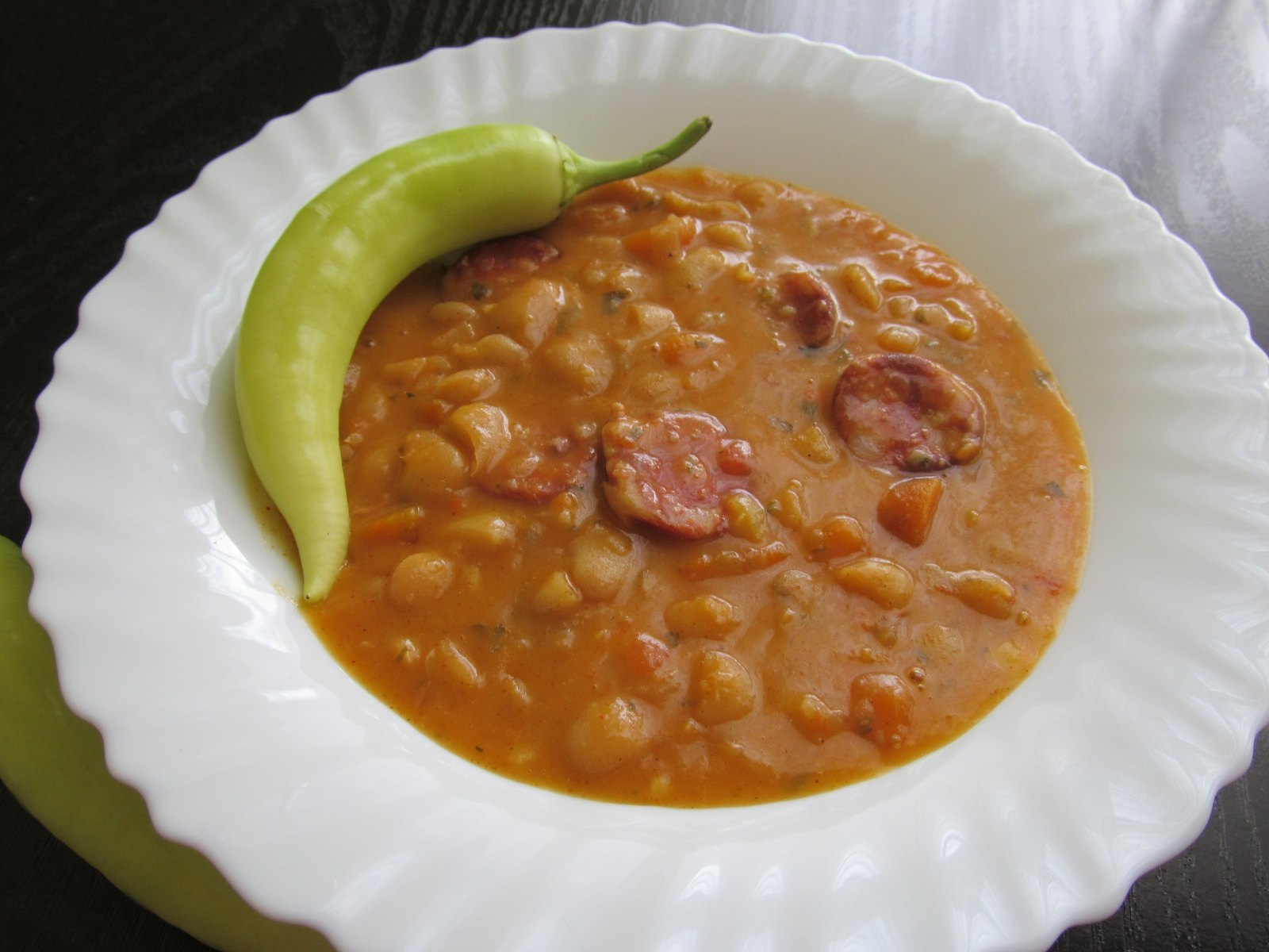 Pasulj je pravo narodno jelo obogatite ga sa kobasicom i uživajte Pasulj